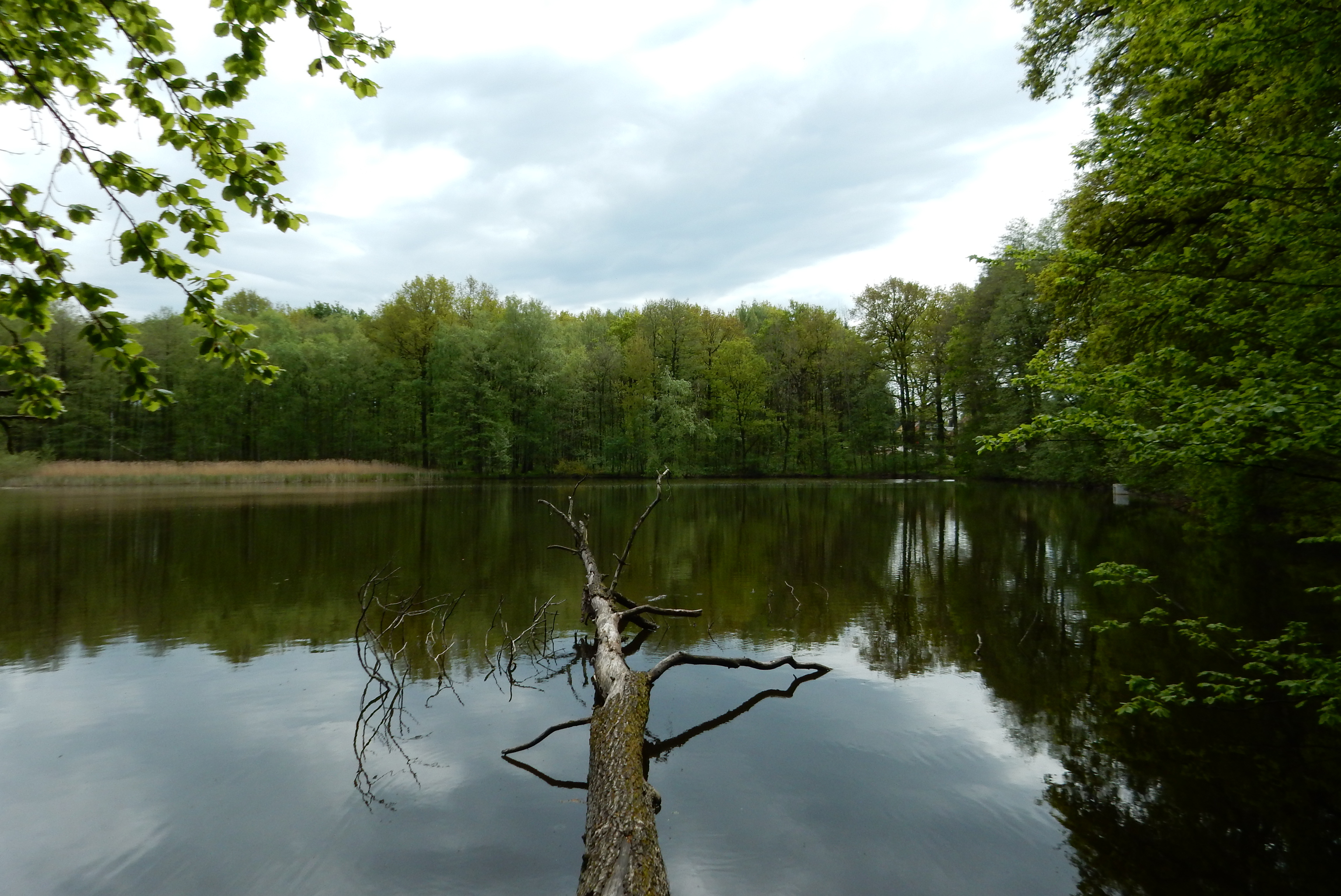 Naturschutzgebiet "Schafteich" in Limbach-Oberfrohna im Landkreis Zwickau (Nr. C84)